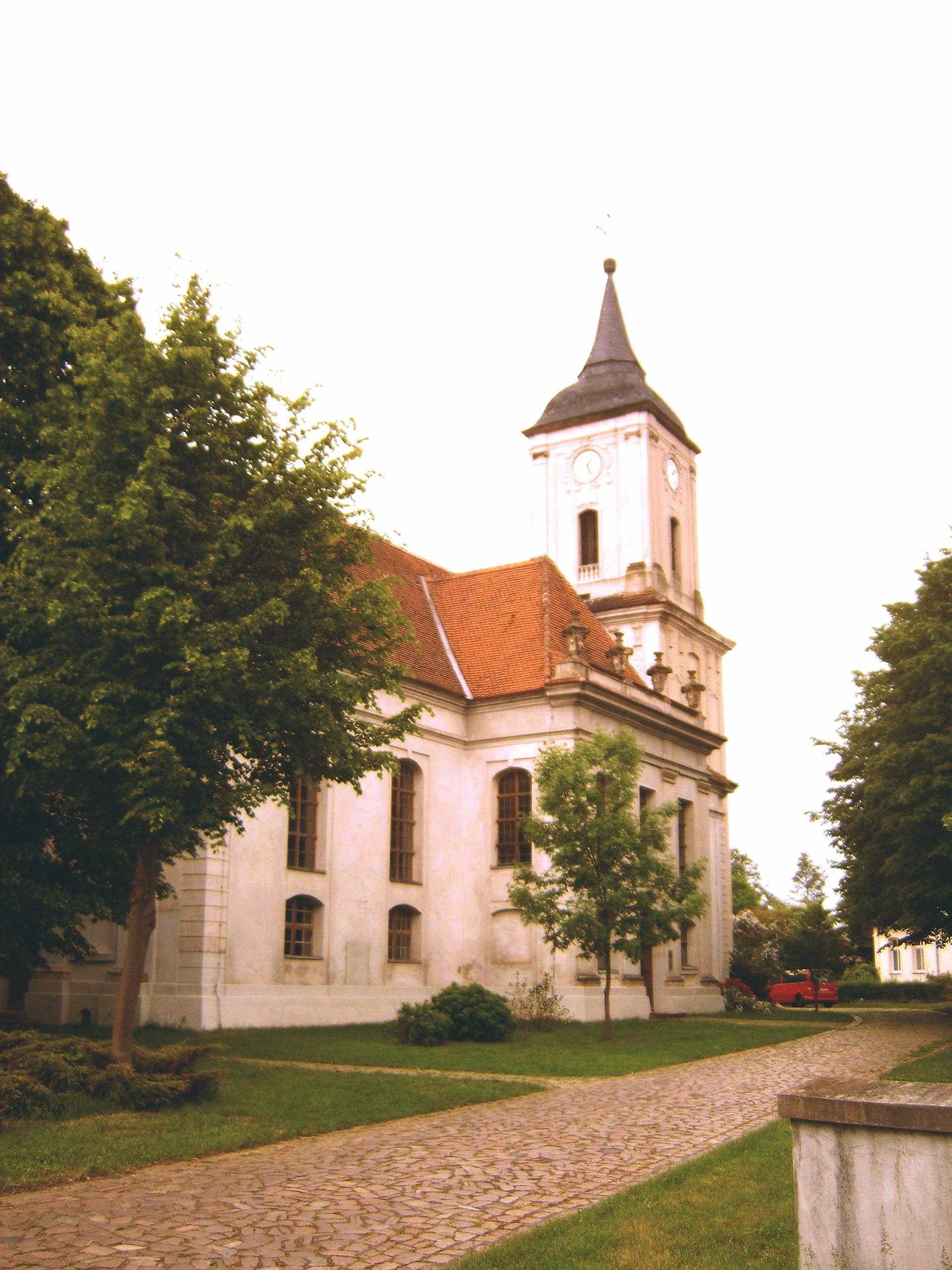 Kirche in Tucheim Bild aufgenommen am 23.5.2006 von Olaf Meister farblich verbessert von Picman